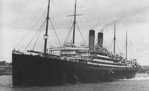 RMS Celtic